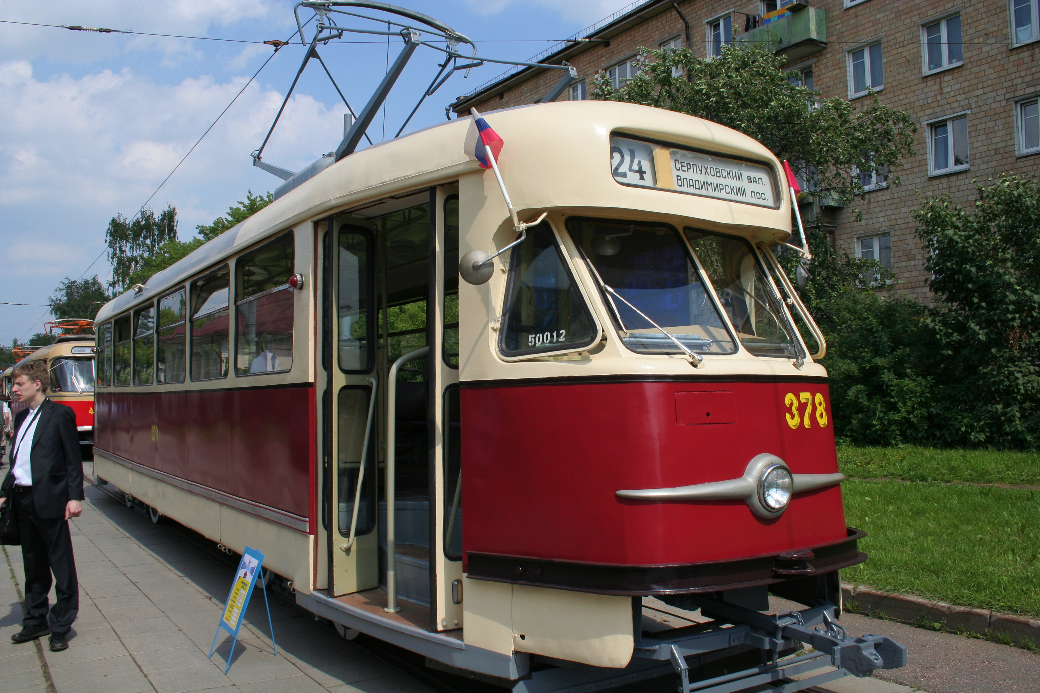 Ретро-трамвай Мосгортранса Татра Т-2 на показе около Депо им. Баумана 12 июня 2010 года.